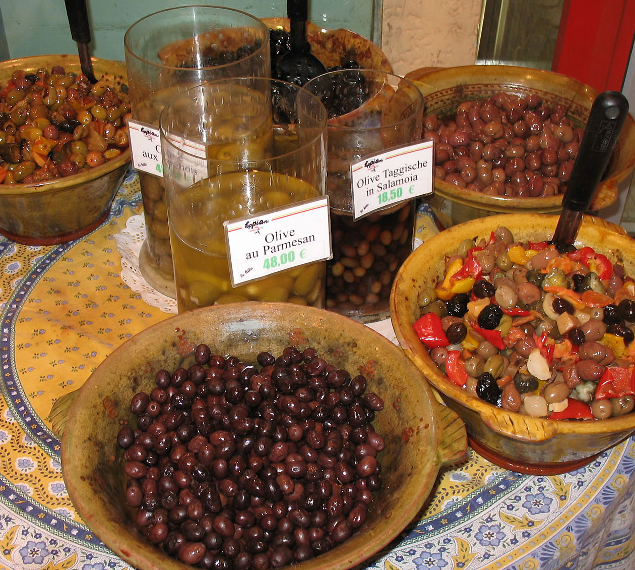 Étalage à Cannes, France